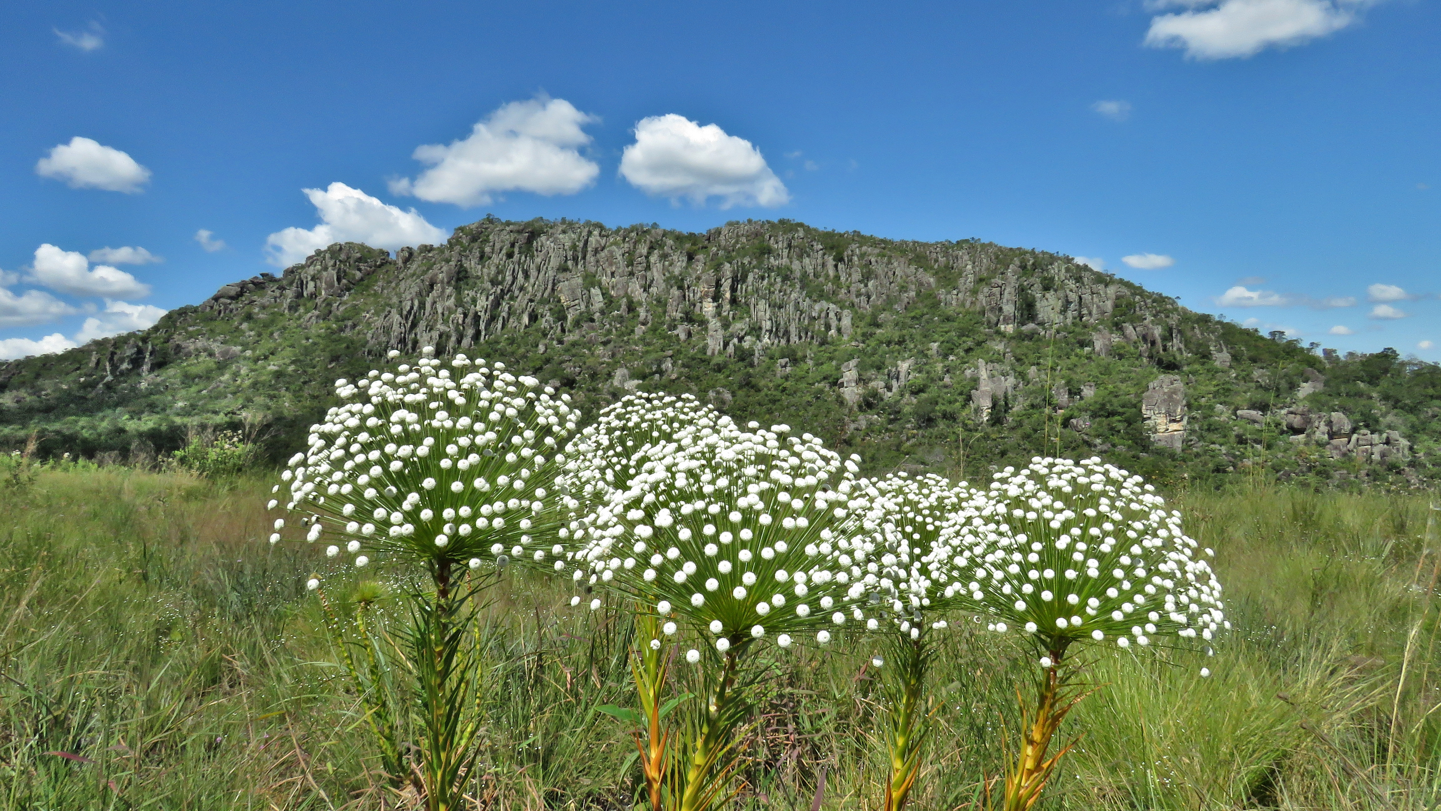 Vista frontal do morro do cabeludo. Em determinadas épocas a flora dos chuveirinhos do cerrado (sempre-vivas) contribuem para o belo visual.